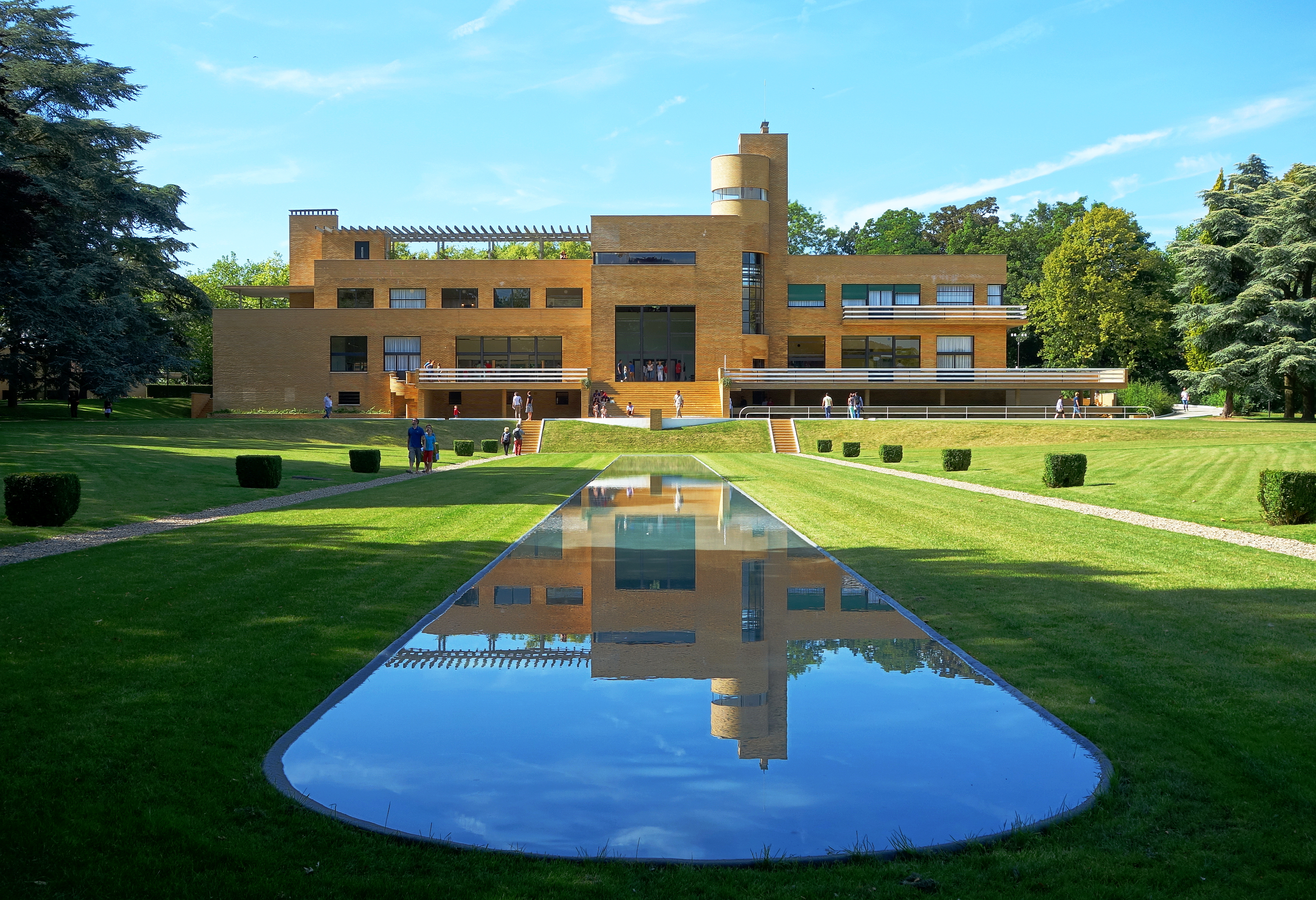 La villa Cavrois à Croix (Nord). .